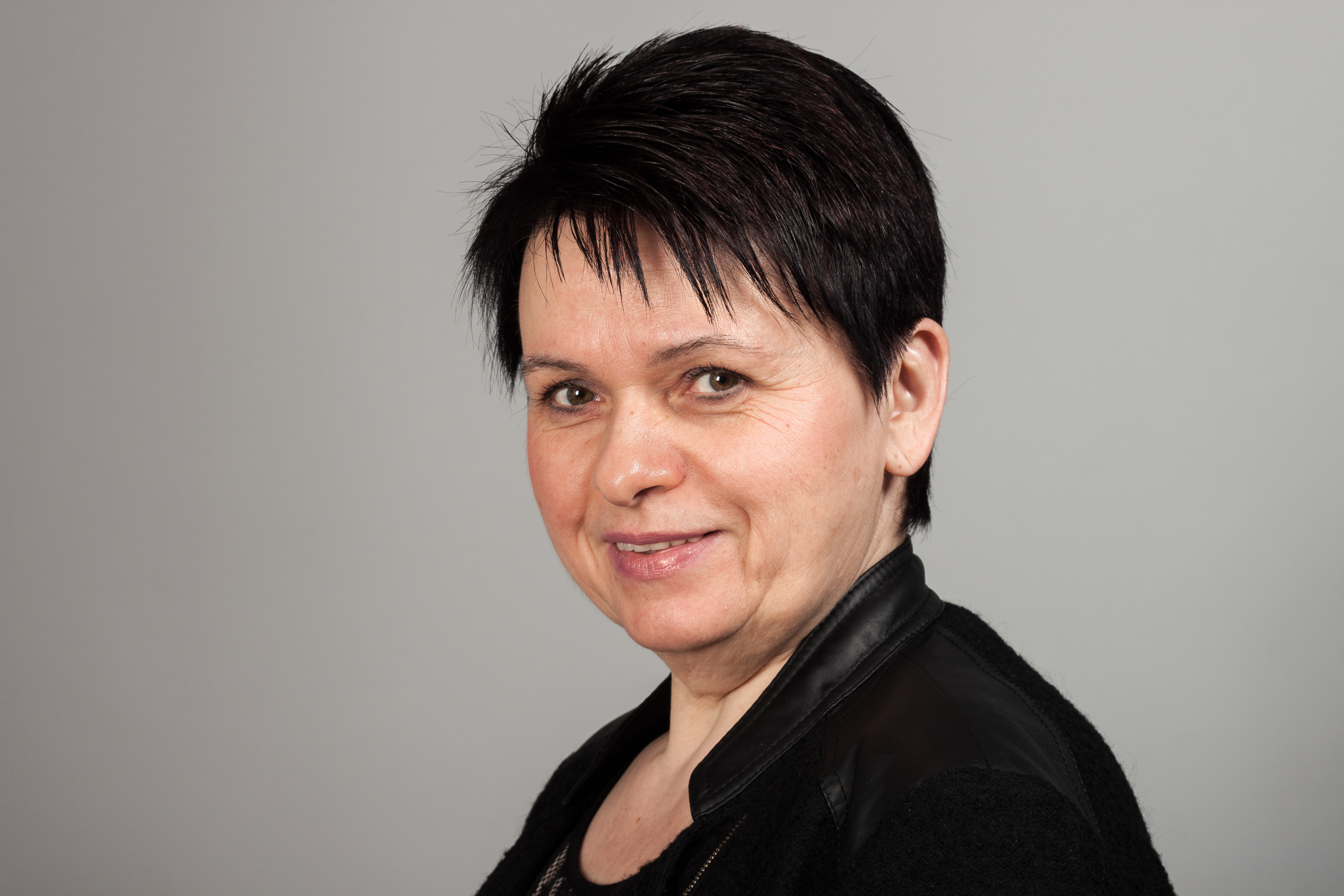 Abgeordnete des Sächsischen Landtages Iris Firmenich